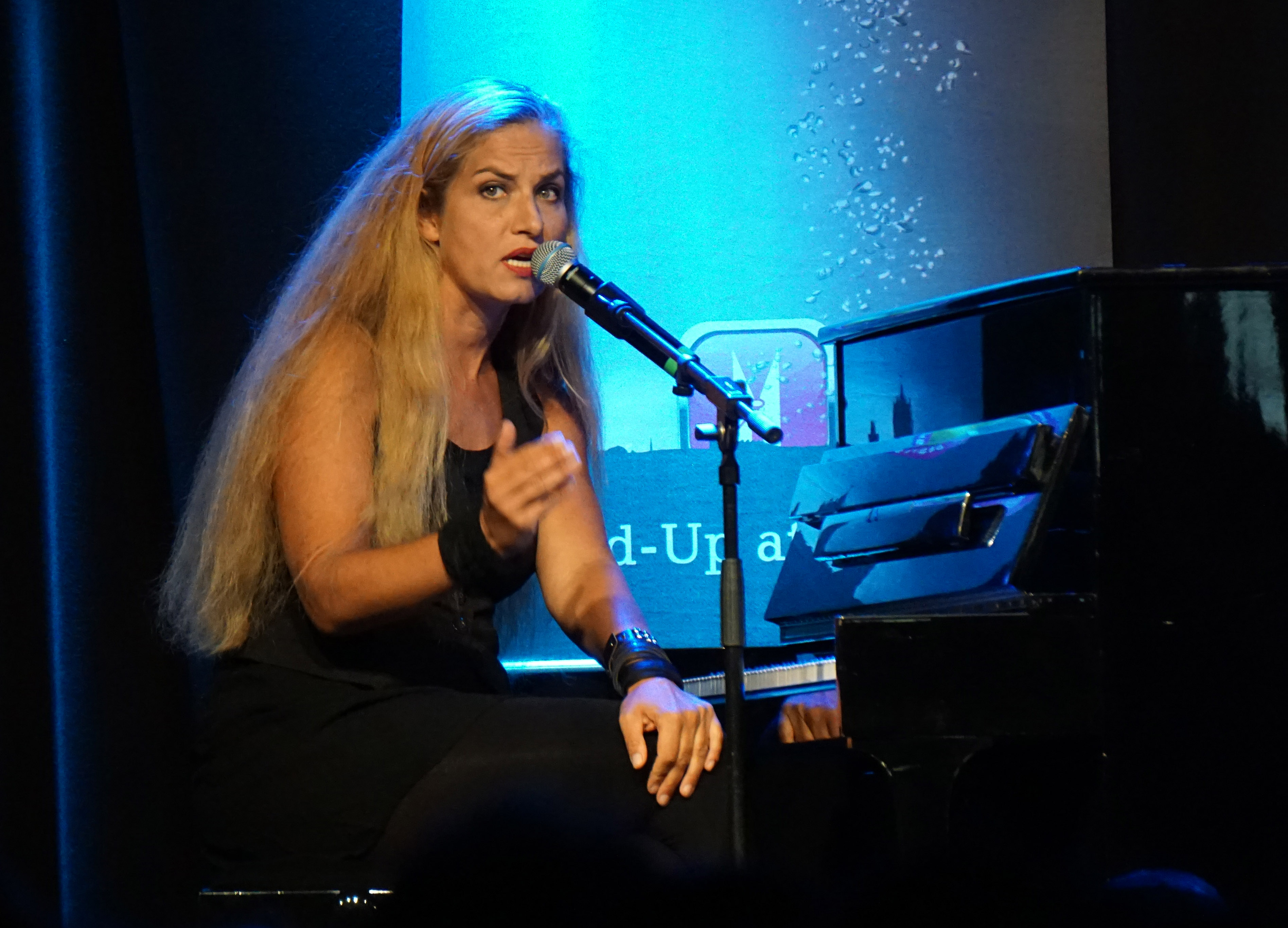 Ariane Müller (deutsche Pianistin, Bandleaderin und Liedermacherin) bei NightWash